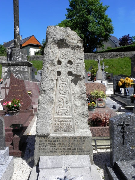 Koadoud. Bez Dir-na-dor 1